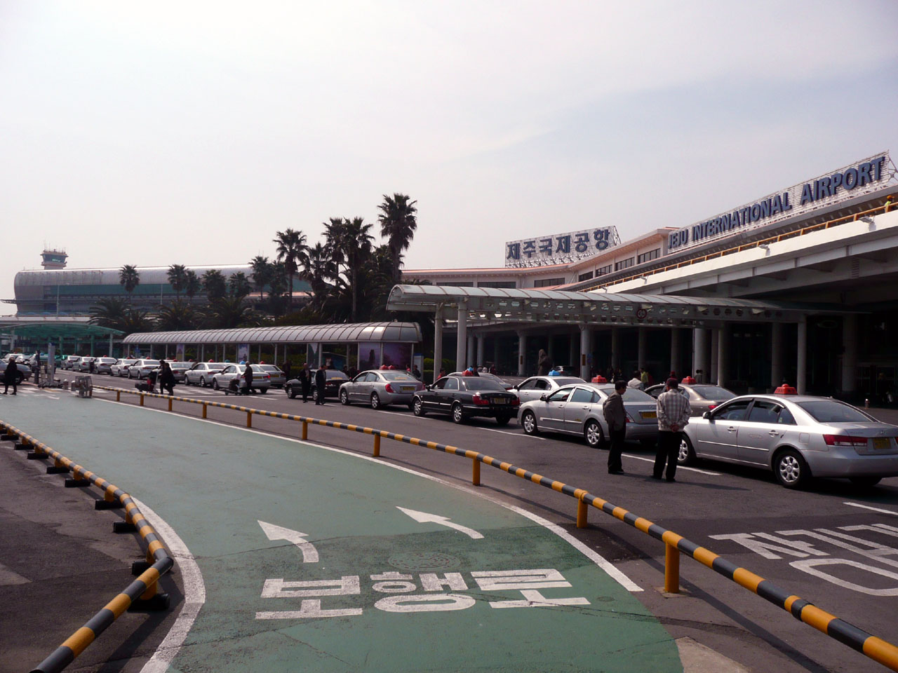 済州国際空港